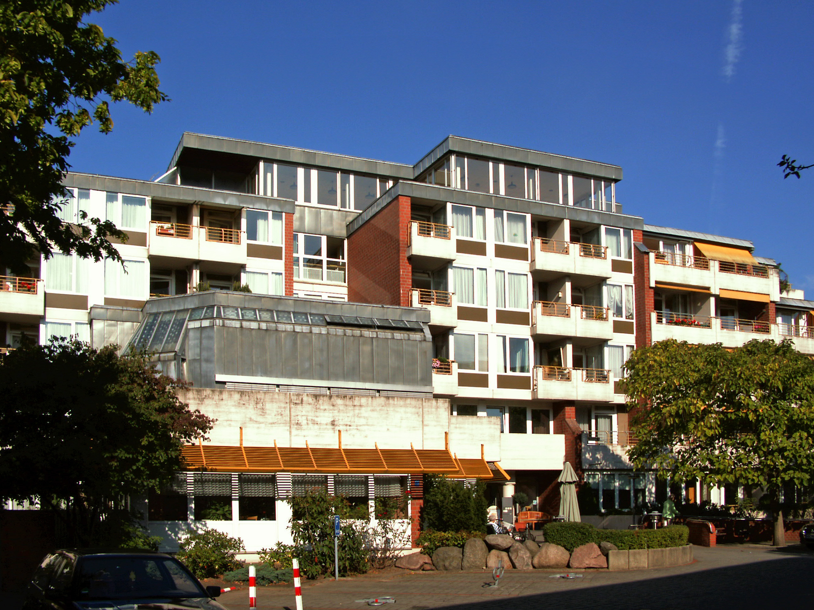 Katholisches Alten- und Pflegeheim St. Elisabeth in Wolfsburg